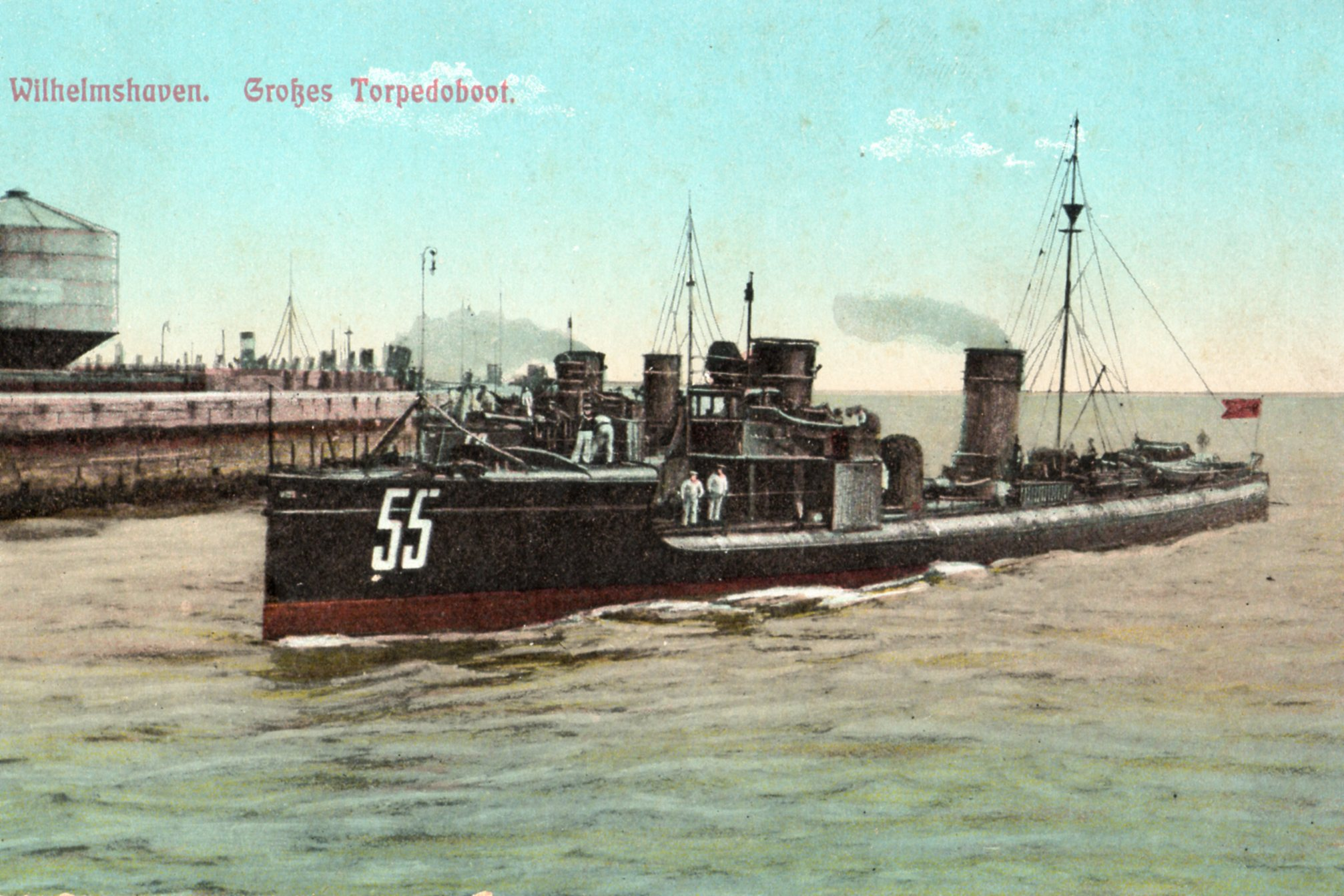 Großes Torpedoboot in Wilhelmshaven ca. 1914. Kolorierte Postkarte. Als Feldpostkarte am 26. Juni 1915 vermutlich aus Wilhelmshaven nach Osternburg im Großherzogtum Oldenburg